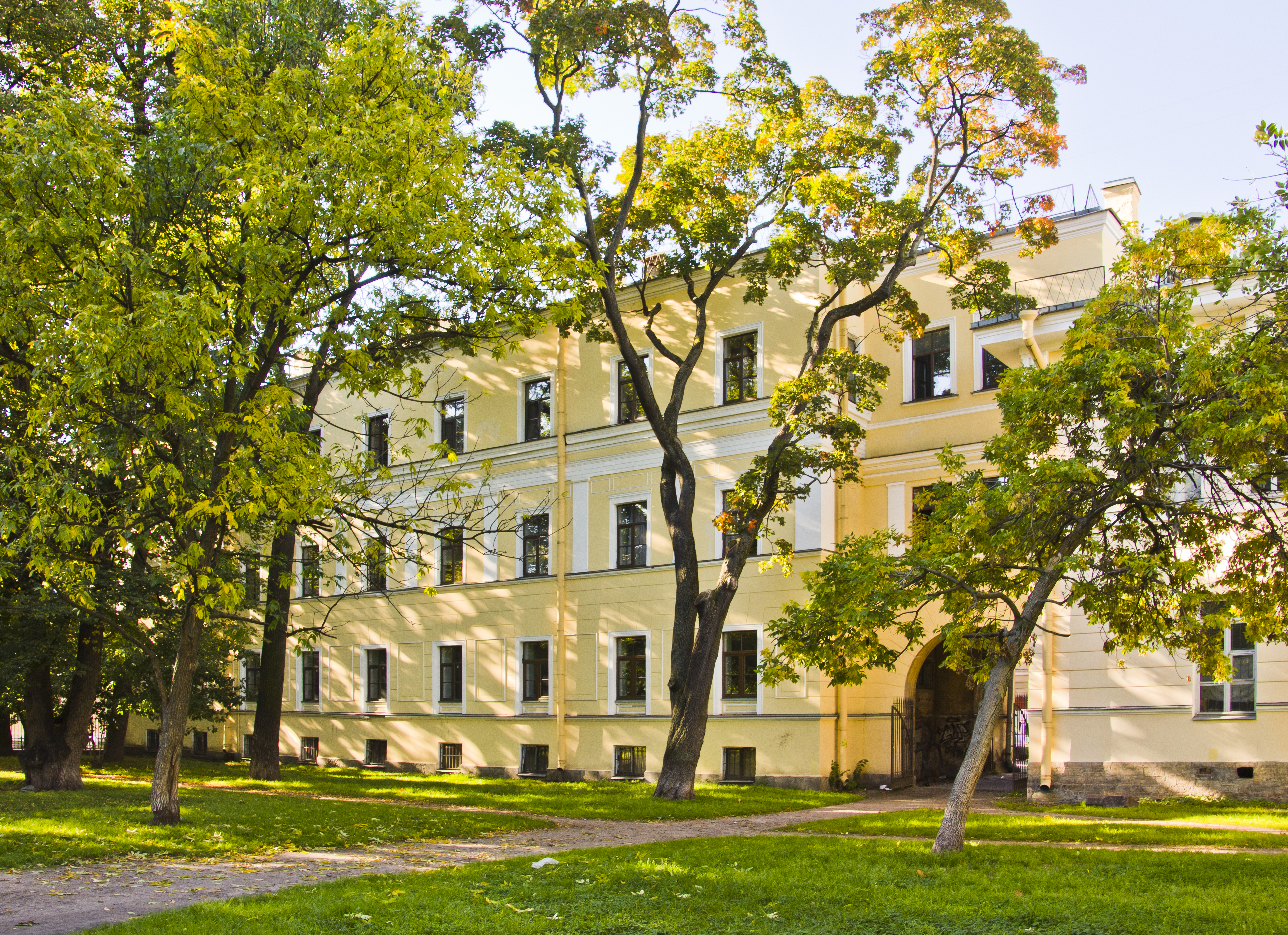 4-я линия, д.3